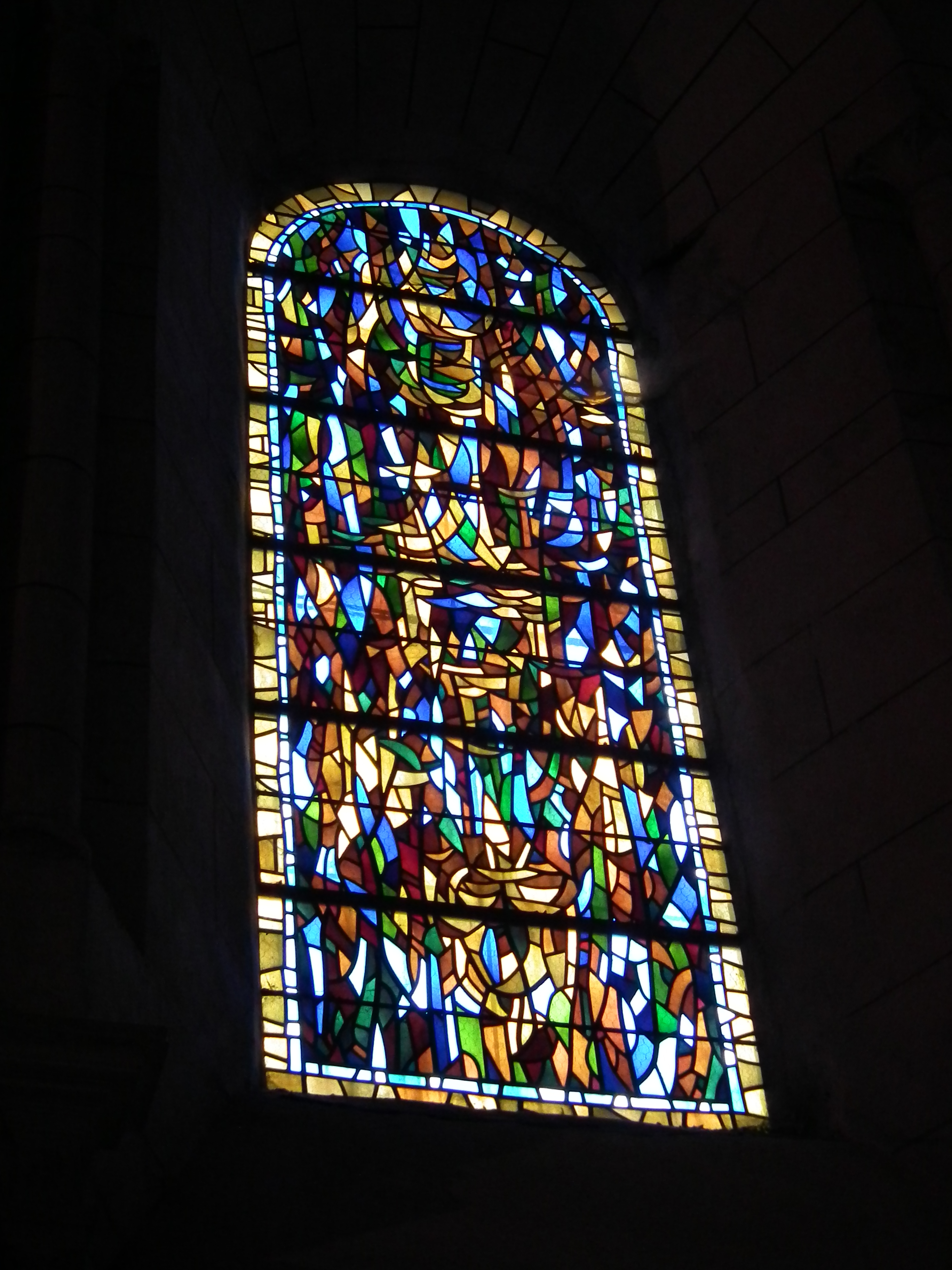 Vitrail de l'église de Barbezieux